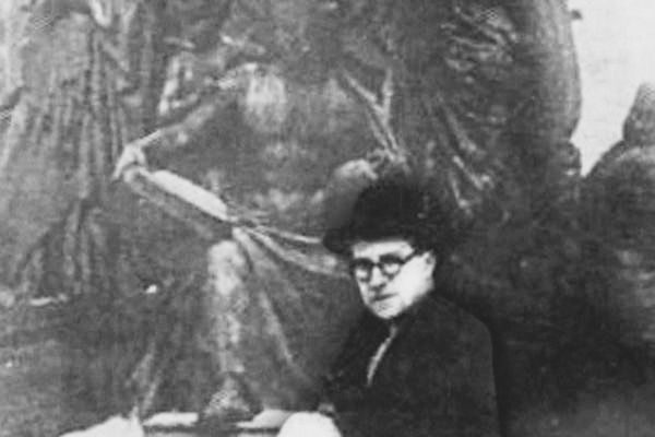 Dr. Carlos Federico Mora cuando era consul de Guatemala en Alemania.